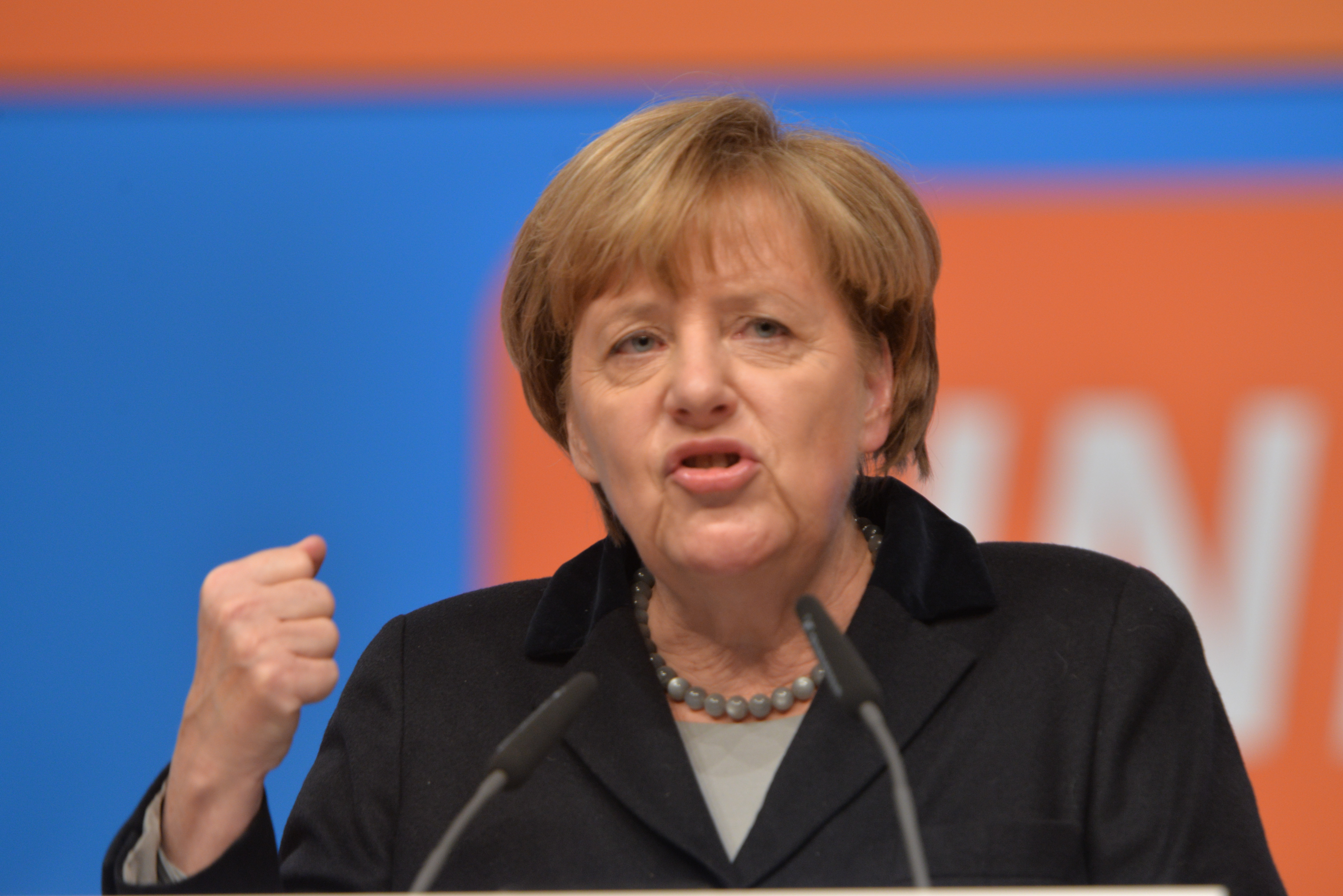 28. Parteitag der CDU Deutschlands am 14. Dezember 2015 in Karlsruhe